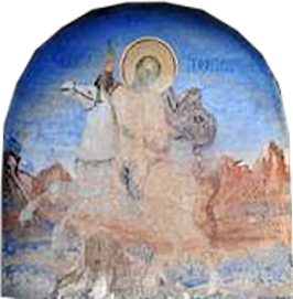 Надвходният стенопис от църквата „Свети Великомъченик Георги“ в кичевското село Мало Църско, Република Македония